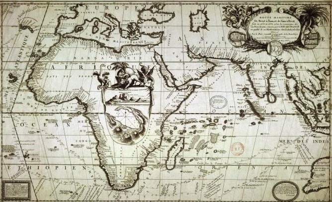 Route maritime de Brest à Siam, et de Siam à Brest ( Coronelli, Vincenzo Maria [1650-1718])